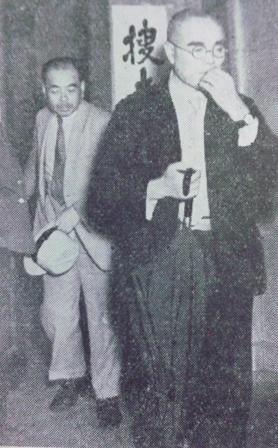 秋谷七郎（右）とjp:古畑種基（左）jp:下山事件捜査本部にて